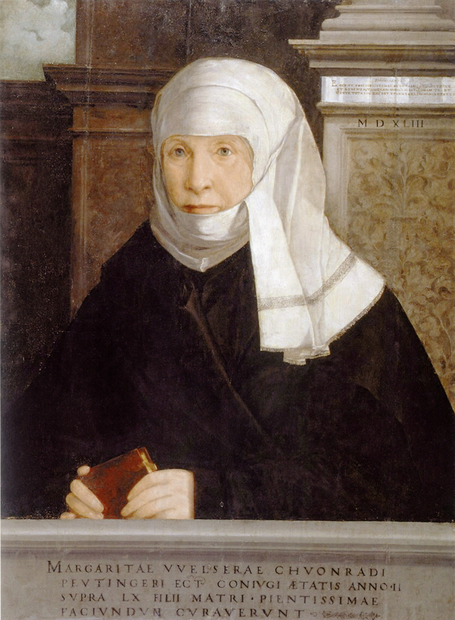 Margarethe Peutinger geb. Welser (Ehefrau des Konrad Peutinger, 1465-1547)